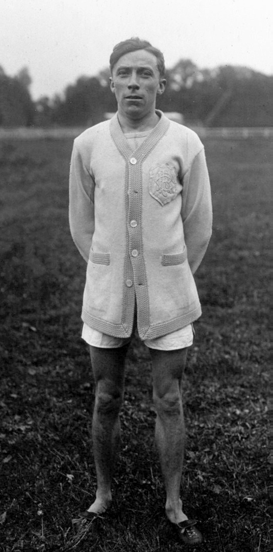 Départ du challenge du Mille à Colombes : Keyser, portrait : [photographie de presse] / Agence Meurisse